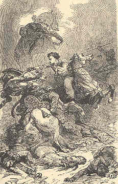 Ilustrace ke knize Alfreda Assolanta Hrdinný kapitán Korkorán. Autor Alphonse de Neuville (1835 – 1885). Zdroj: vlastní sken